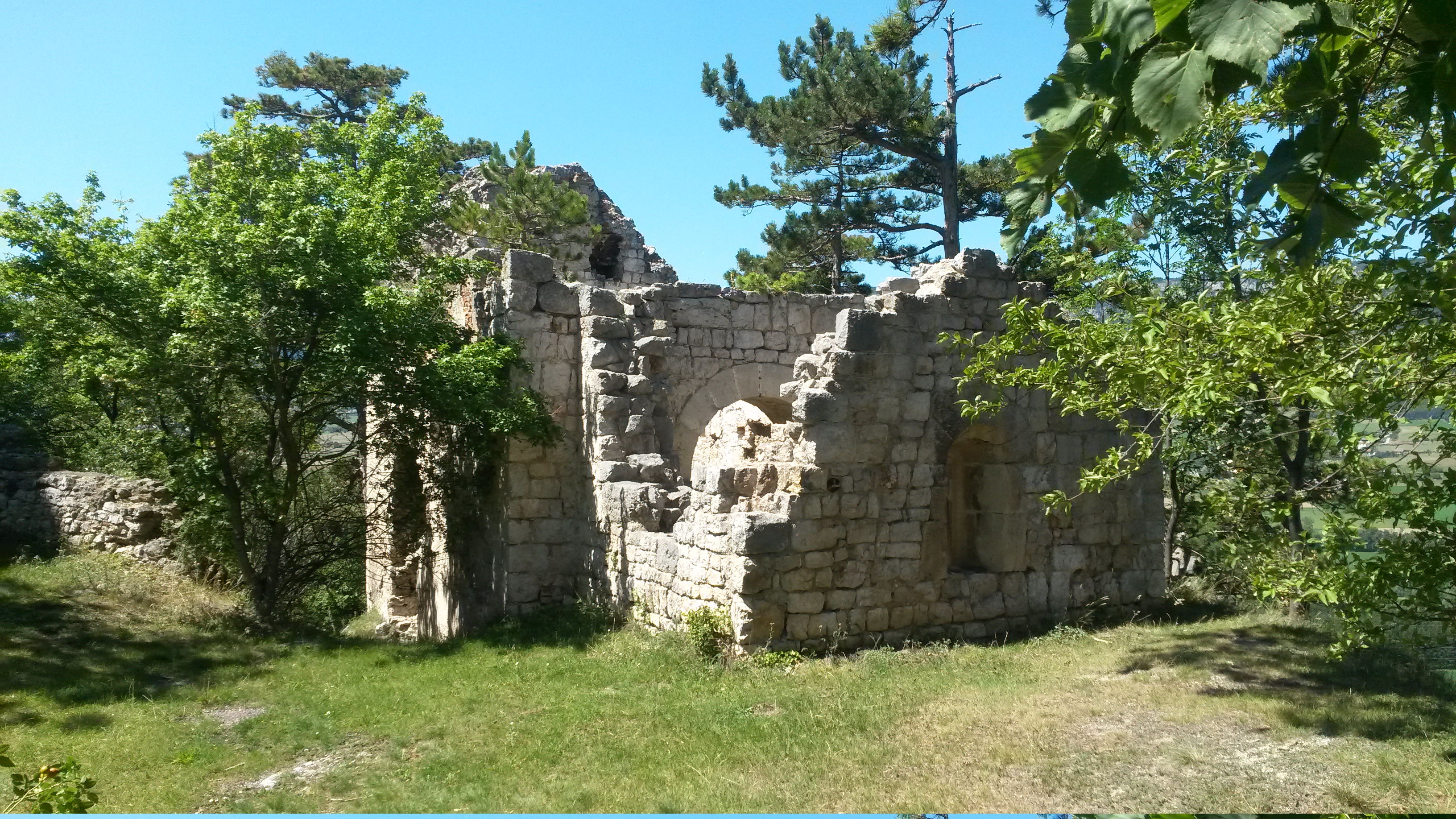 Ruine der Burgkapelle von Emmerberg (A).